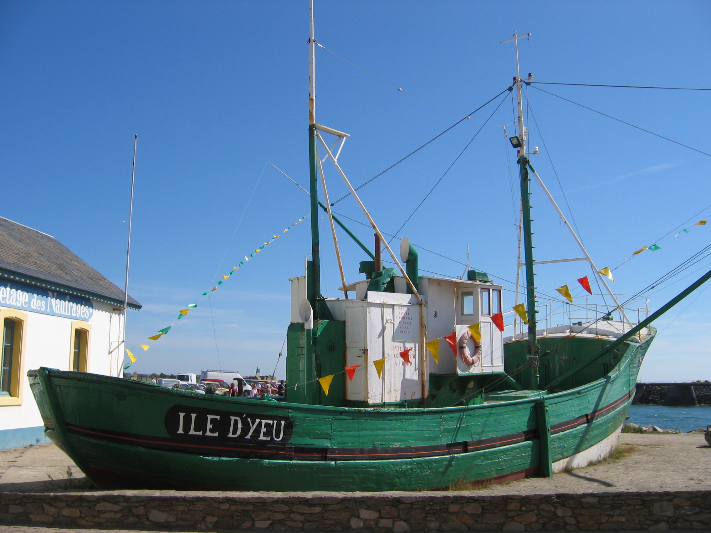 Thonier à cul rond de l'Île d'Yeu (La Caravelle) - Port d'attache Ile d'yeu - Photo prise par mes soins